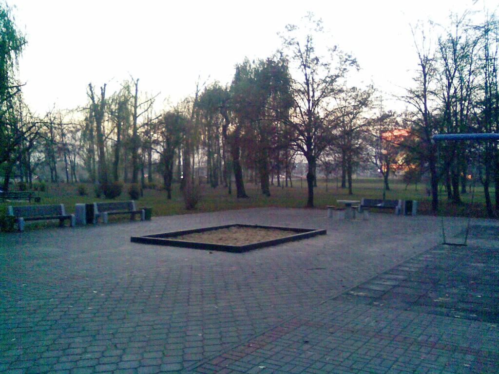 Plac Budnioka w Katowicach